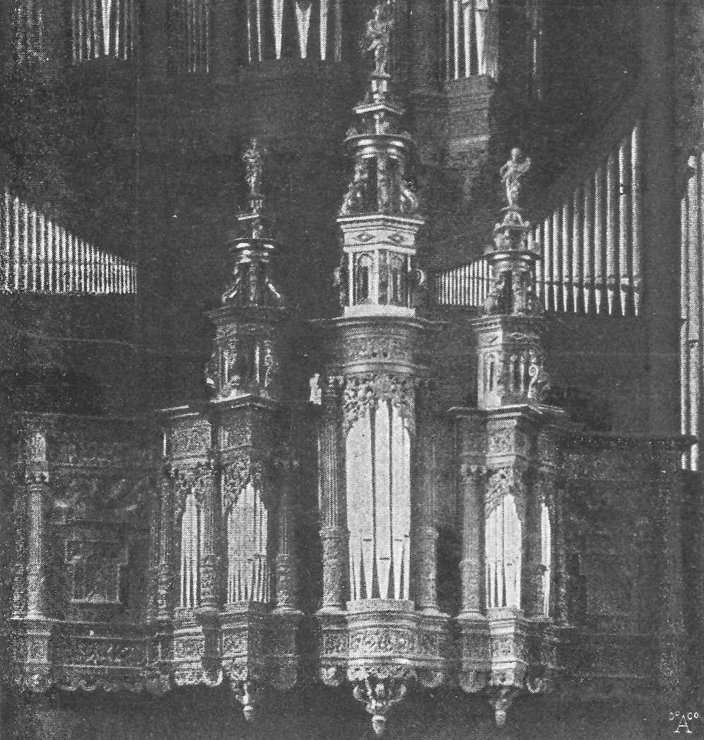 Dom Minden